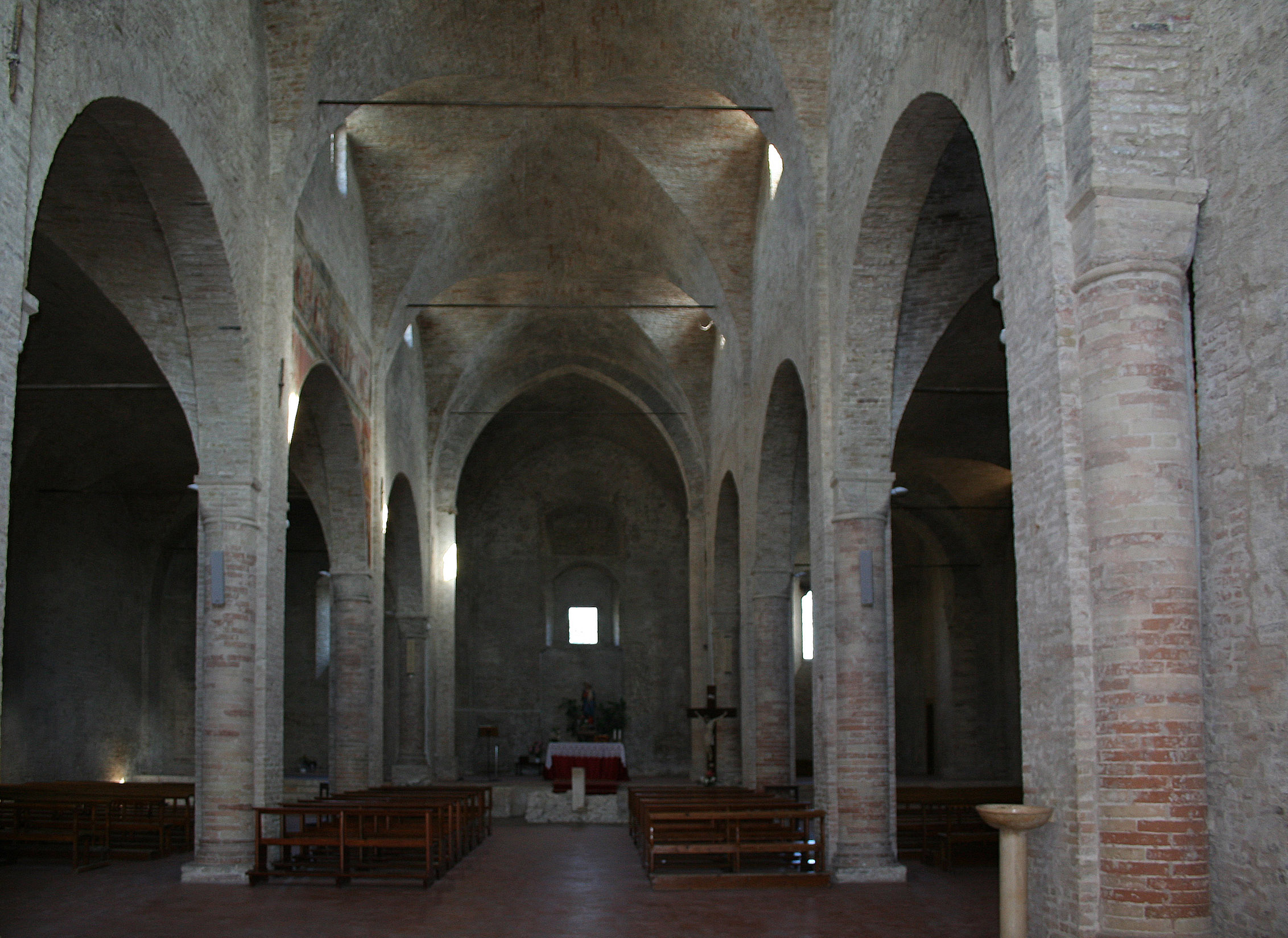 Chiesa di Santa Maria di Propezzano, interno dell'edificio religioso appartenente al complesso abbaziale omonimo nelle vicinanze del paese di Morrod’Oro in provincia di Teramo, Abruzzo, Italia.